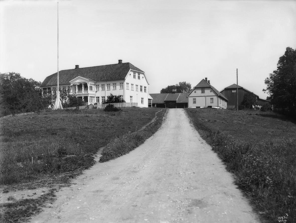 Ris hovedgård fotografert av Anders Beer Wilse, ca. 1920. Fra Byhistorisk samling hos Oslo Museum.